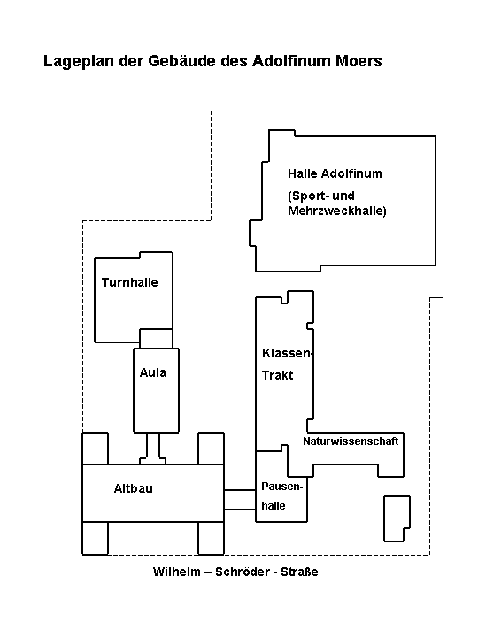 Lageplan der Gebäude des Gymnasium Adolfinum Moers (Stand um 2000)